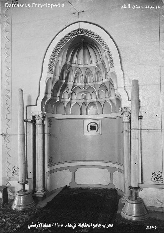 الصورة تظهر محراب جامع الحنابلة عام 1908